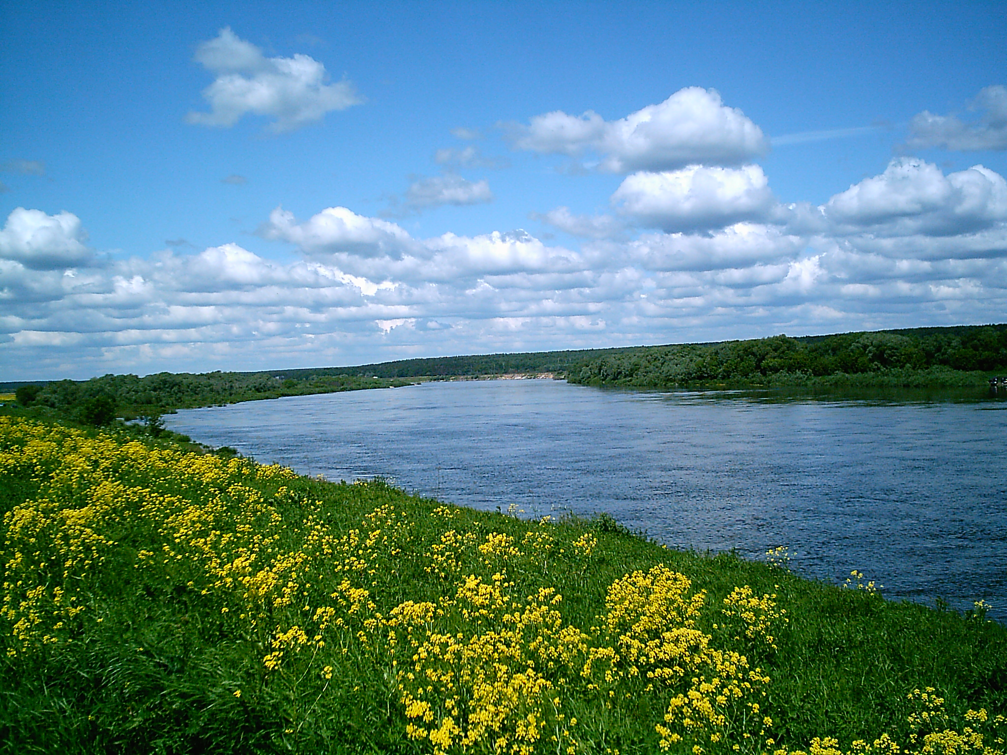 Вид на Оку